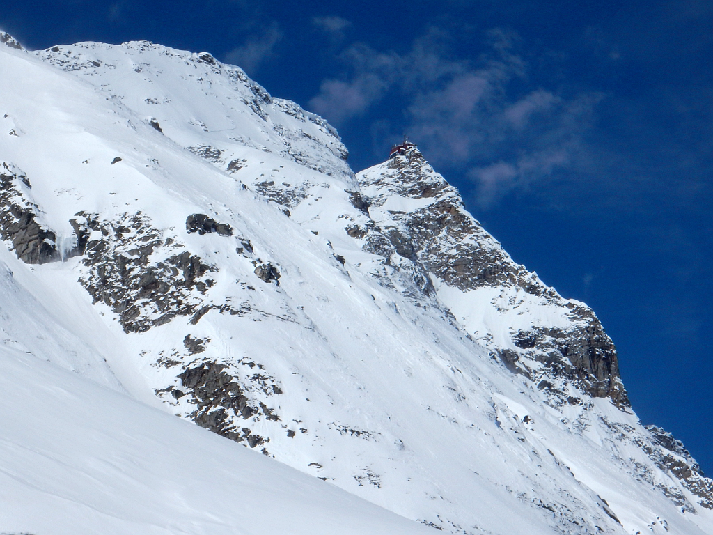 Jihovýchodní hřeben Hoher Sonnblick